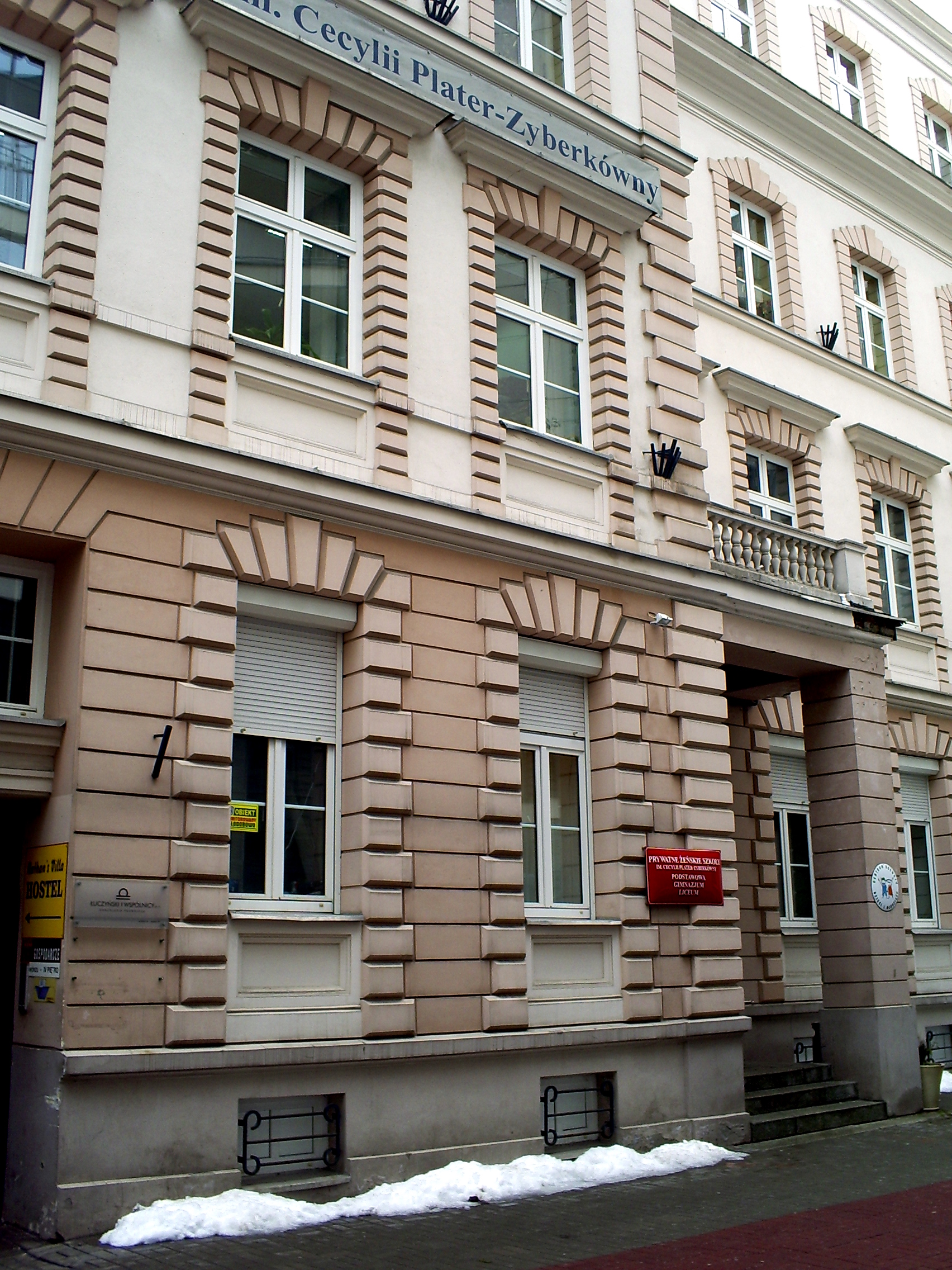 Szkoła im. Cecylii Plater Zyberkówny w Warszawie